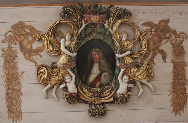 Ernest Bogusław de Croÿ, portrait @Kamień Pomorski cathedral pipe organs, Poland